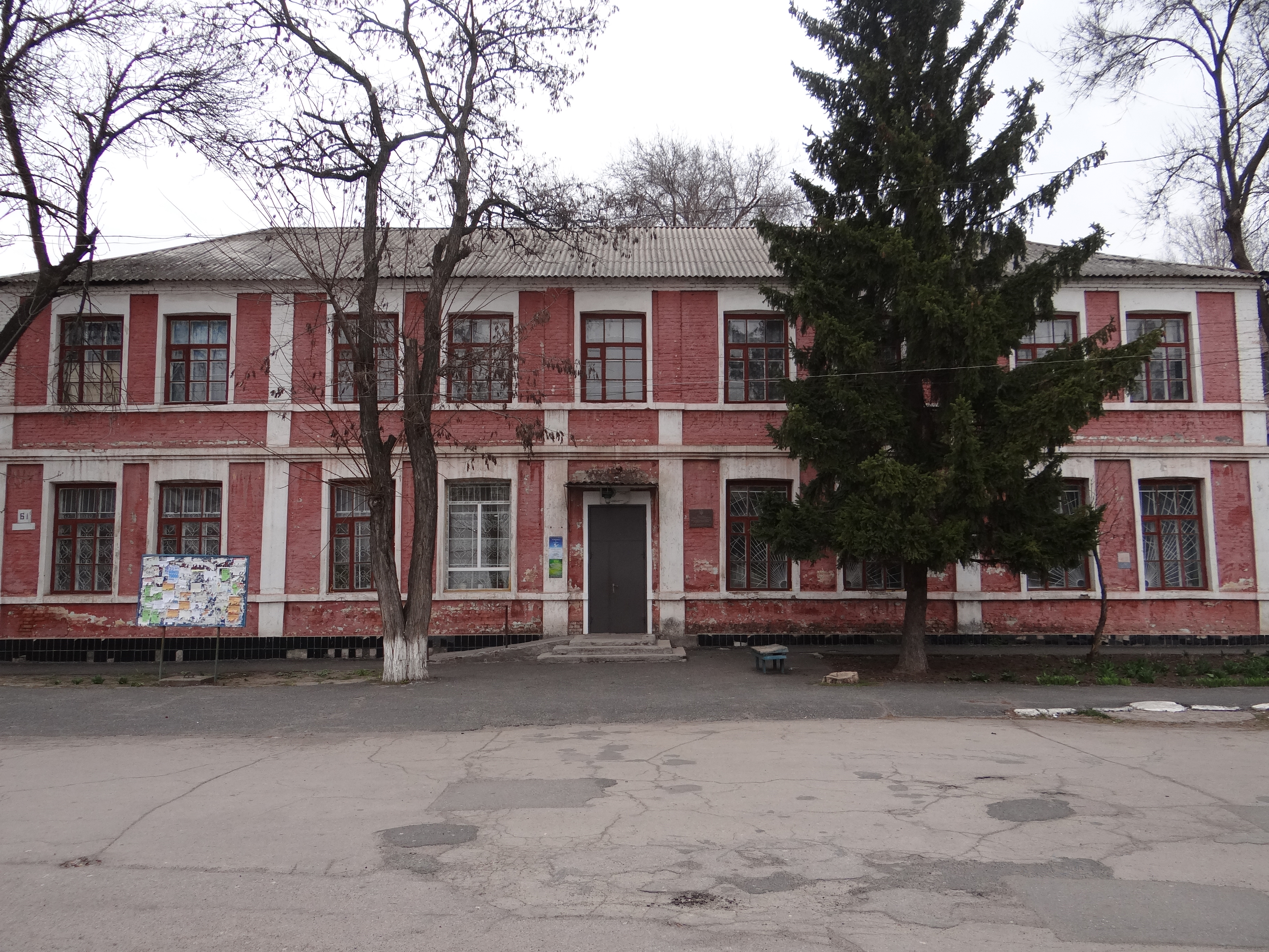 Апостолівський історико-краєзнавчий музей